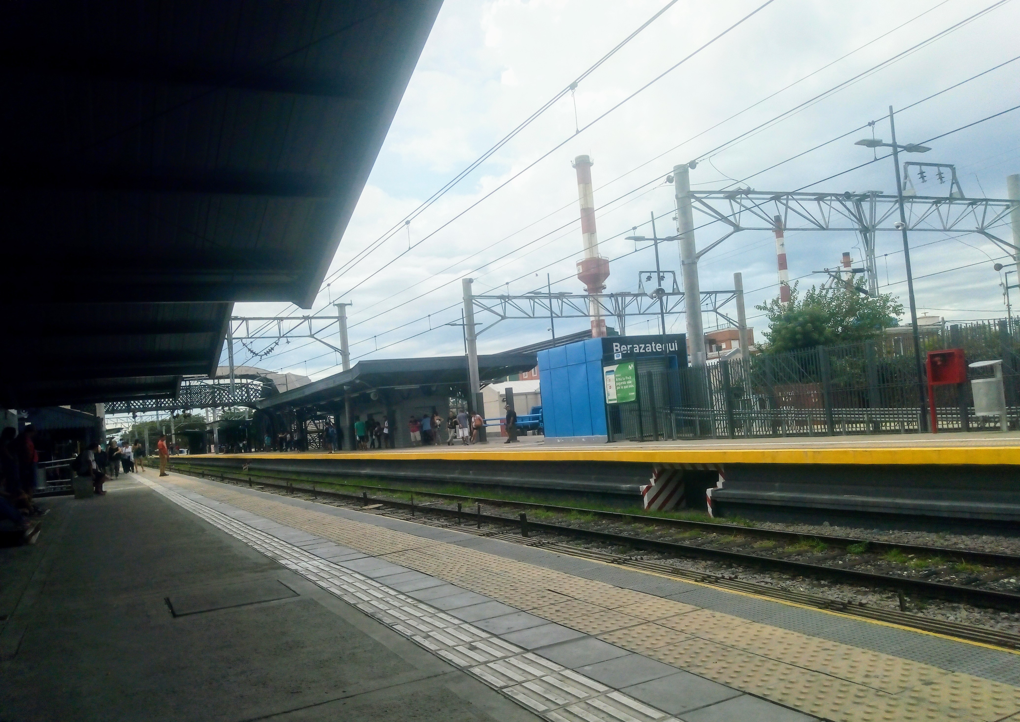 Estación Berazategui